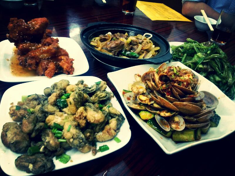 中文（香港）: 吃飯時前先拿起手機，為食物拍下一張美麗的相片